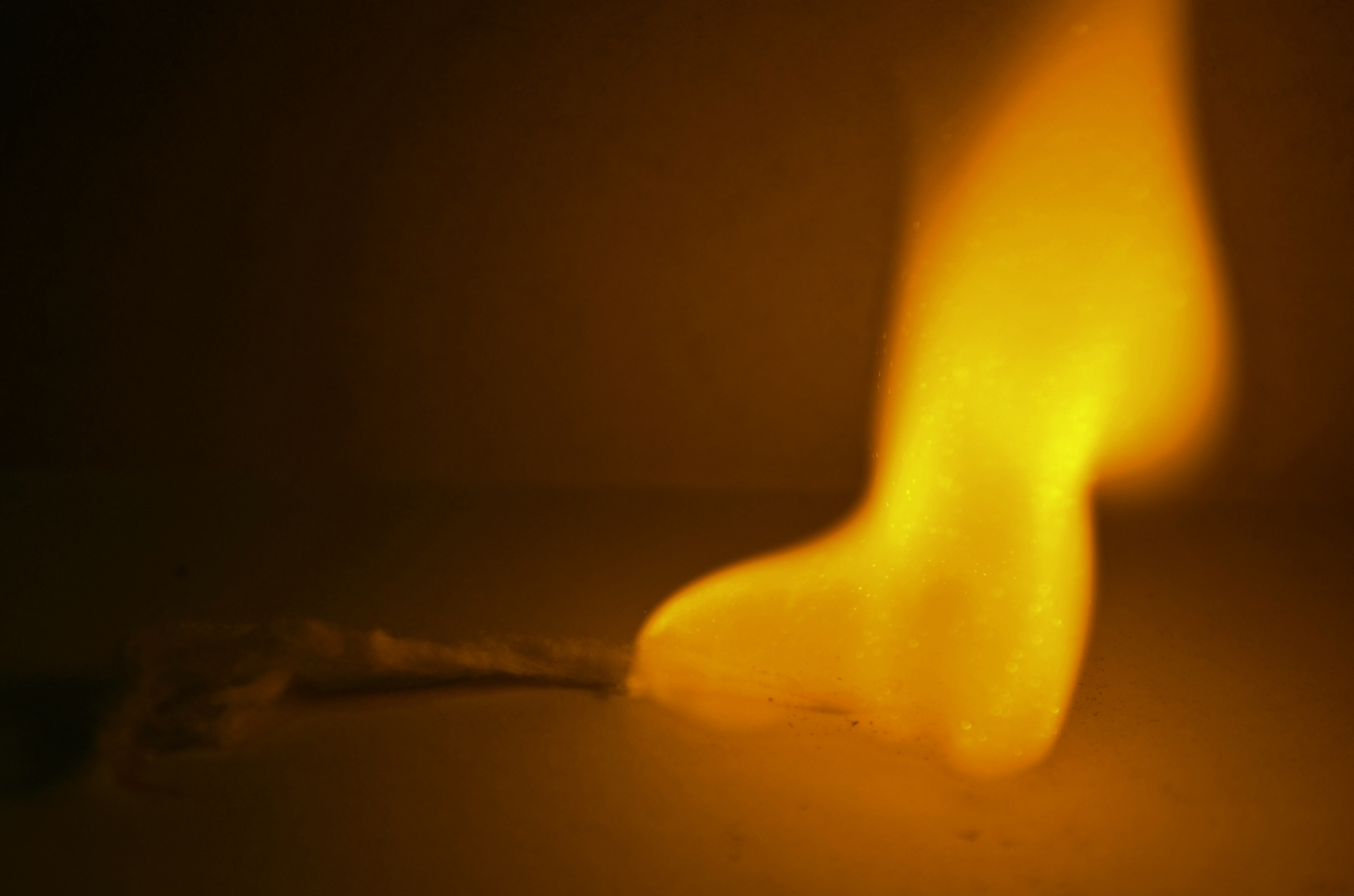 Põletamine väikese tükki nitrotseluloosi, mis on pildistatud väga kiire kaameraga.